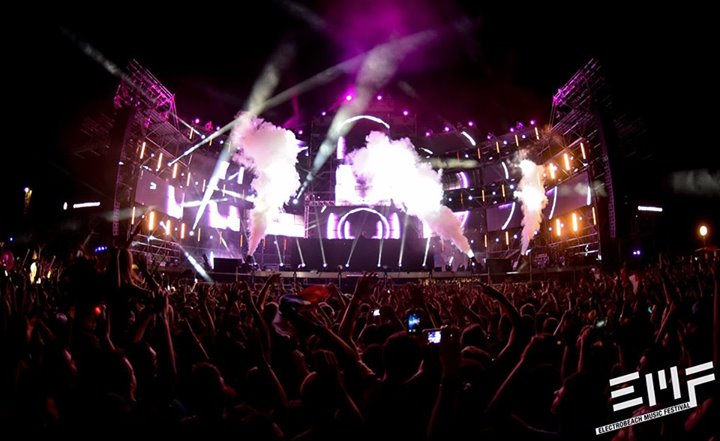 Electrobeach 2014